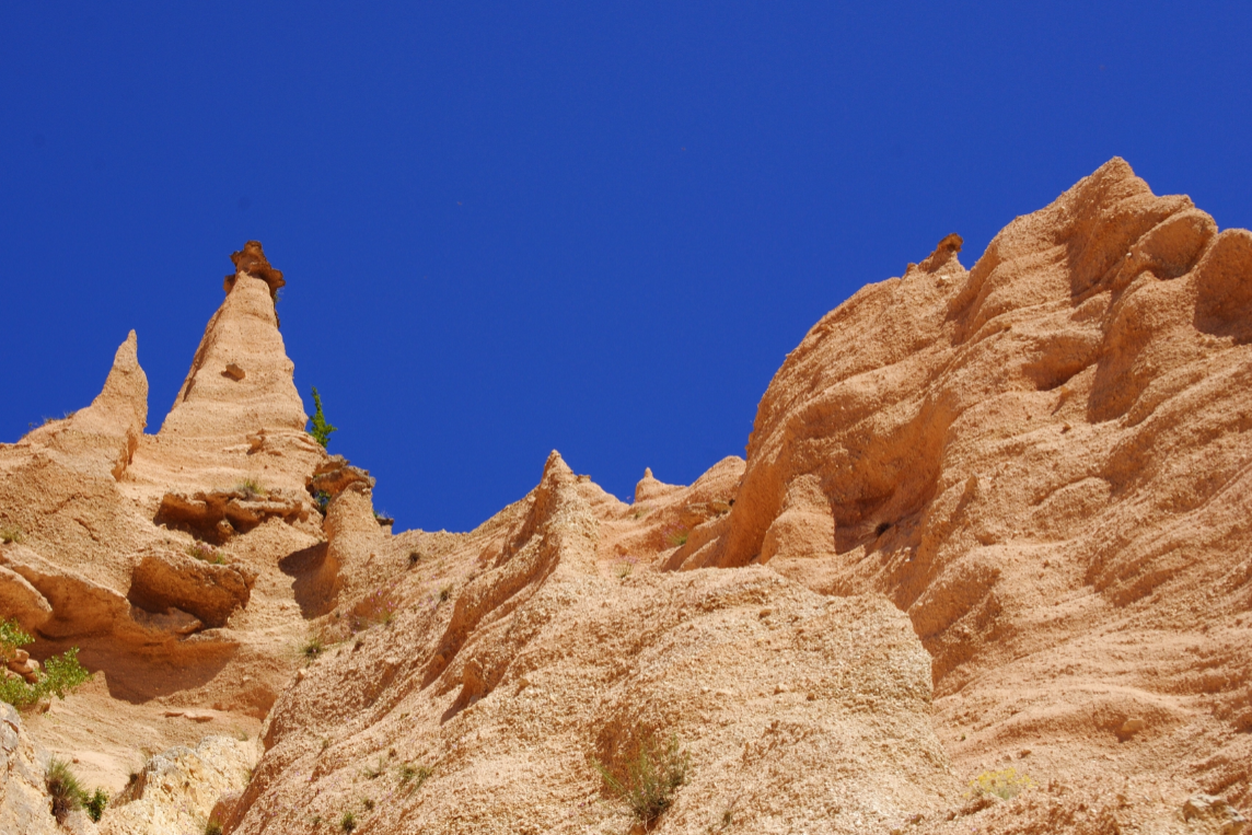 Lame Rosse, definito il canyon d'Italia